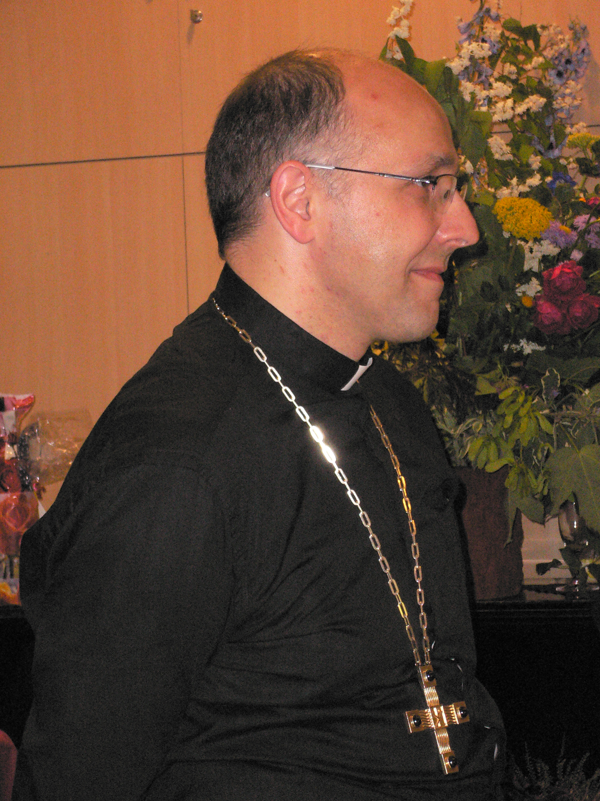 Bischof Hans-Jörg Voigt